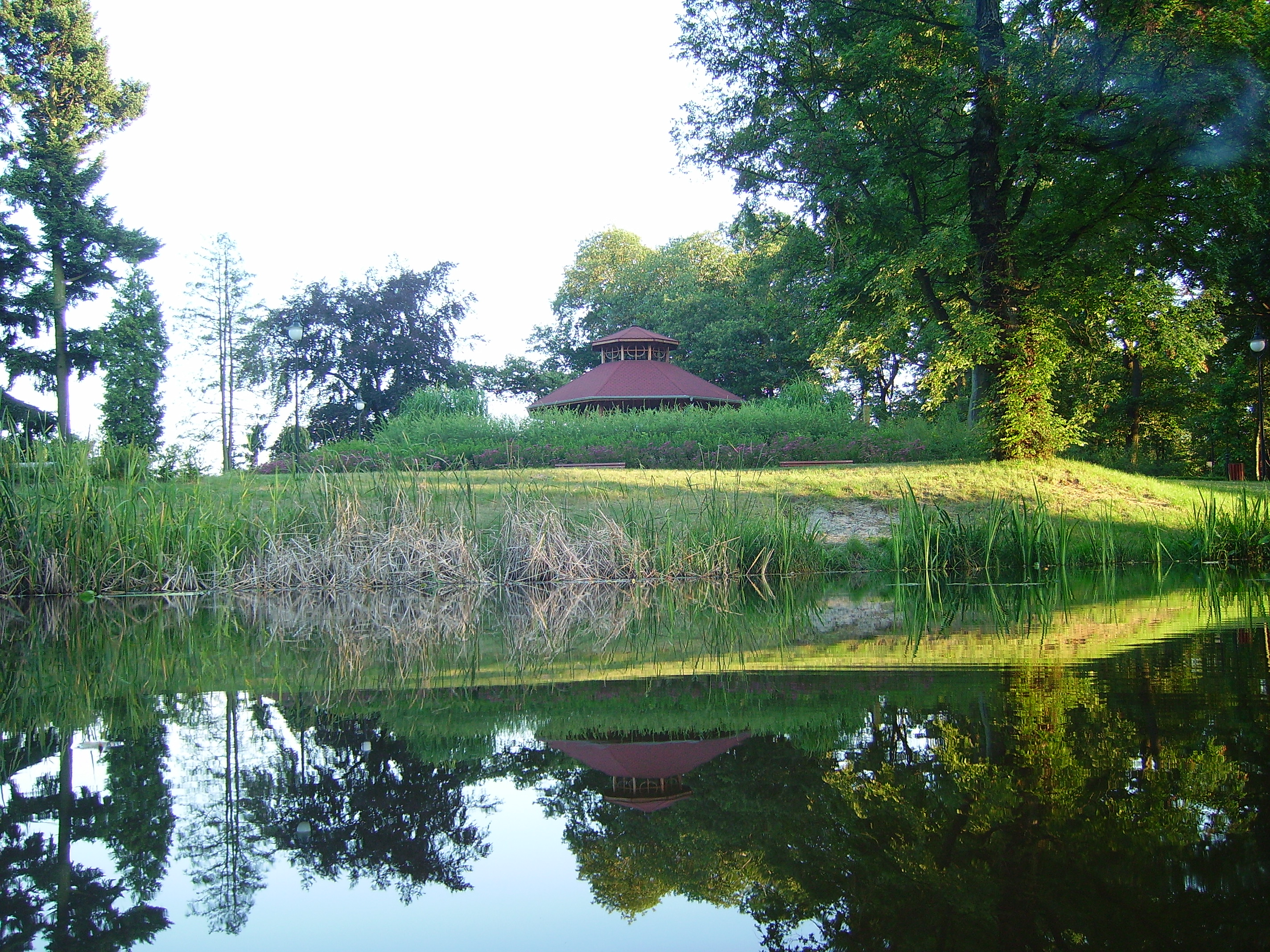 Park w Ruszowie widok z pomostu